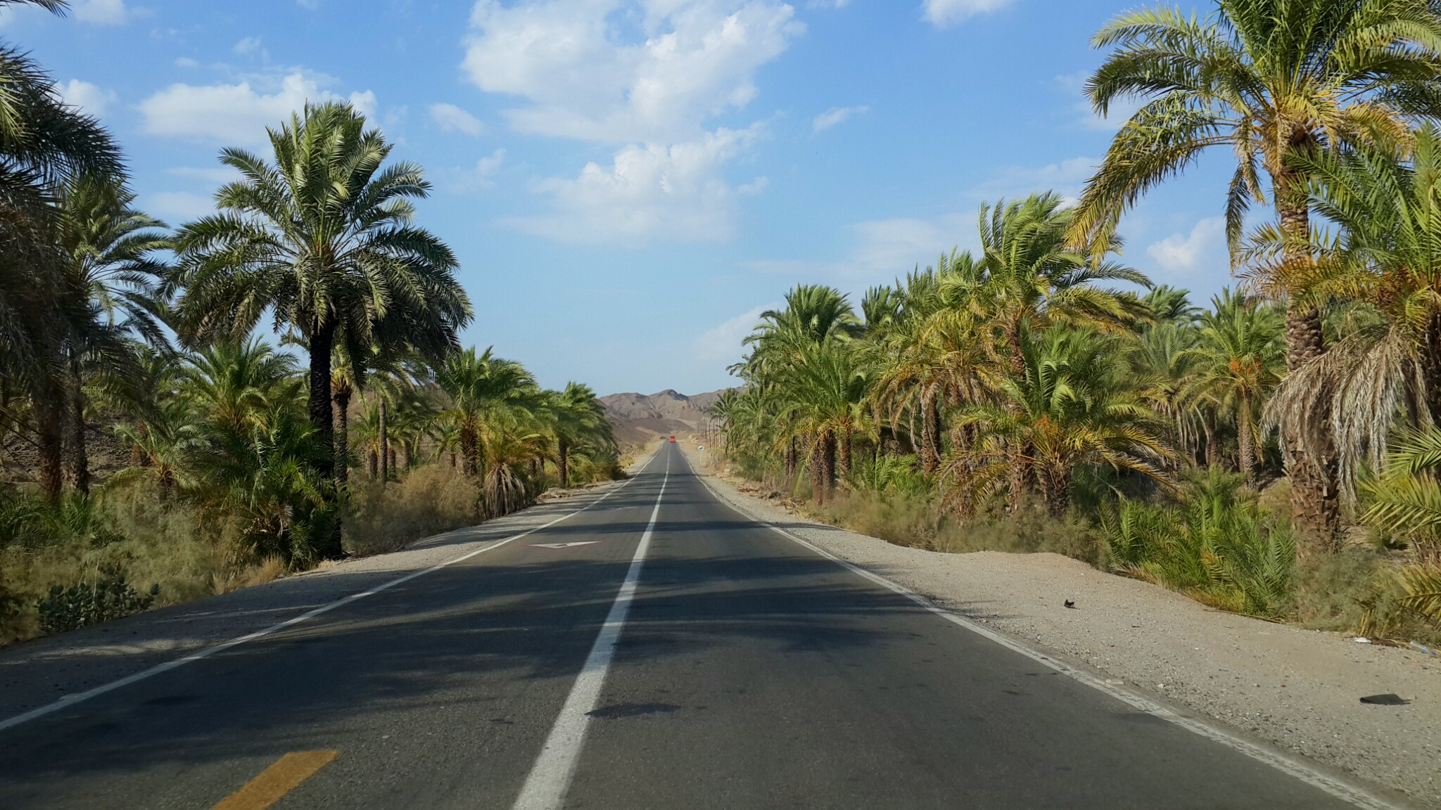 سراسر نما جاده ایرانشهر خاش دامن